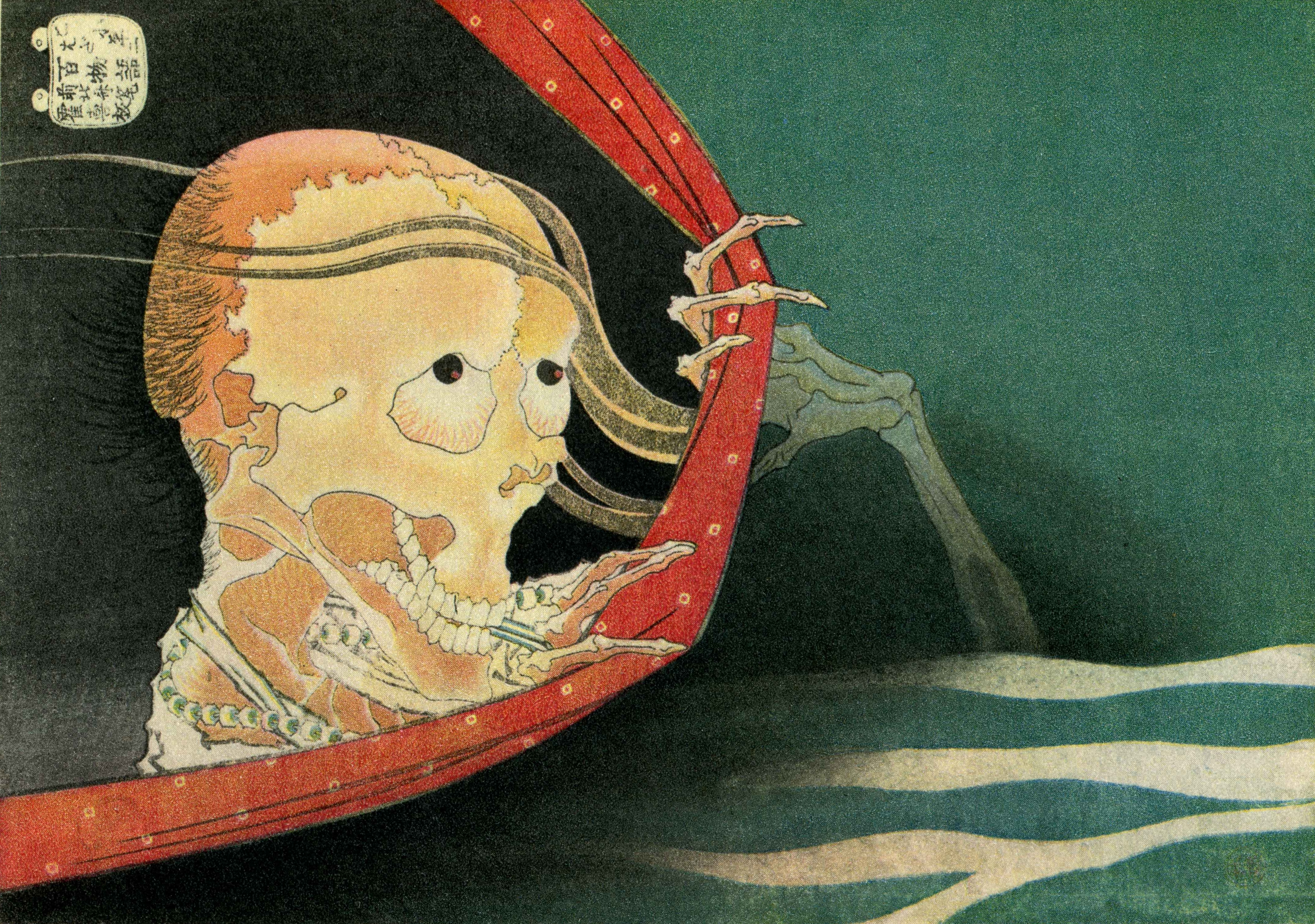 Blatt aus der Serie der Hundert Gespenstergeschichten von Katsushika Hokusai (1760-1849)